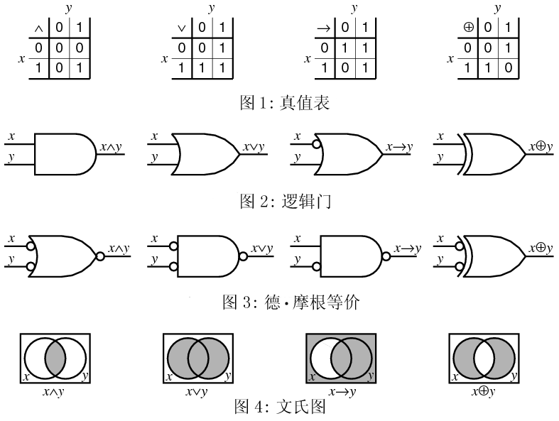 从英文版的图片Baops.gif汉化而来，源作者 Vaughan Pratt，他允许自由更改和发布。